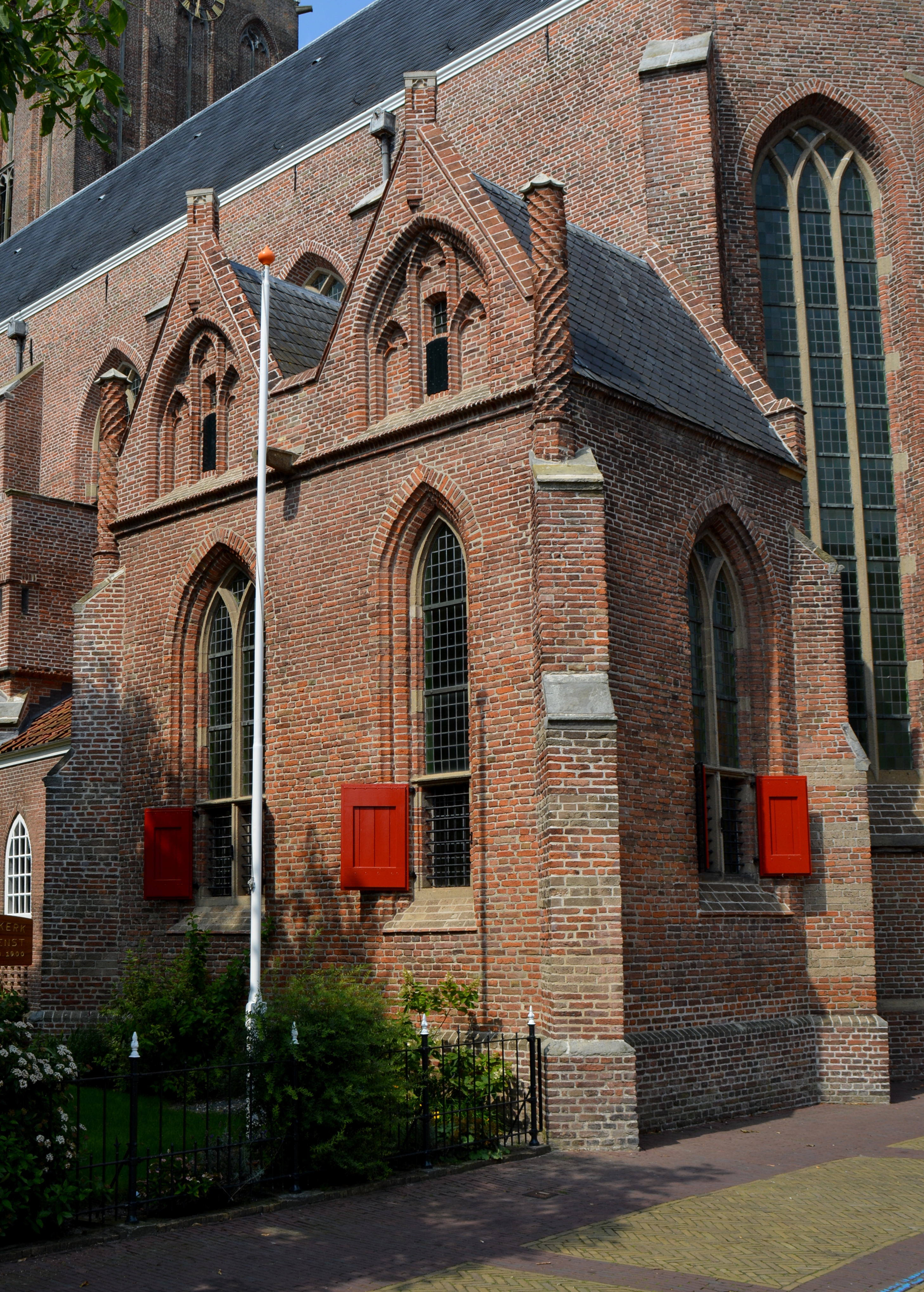 Hasselt, Stefanuskerk, sacristie